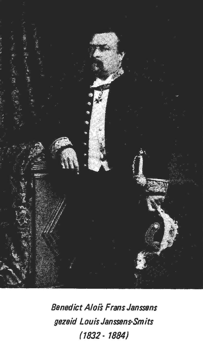 portret Datum ongev.1880 Auteur Jozef Janssens (+ 29-6-1930) Toestemming OD